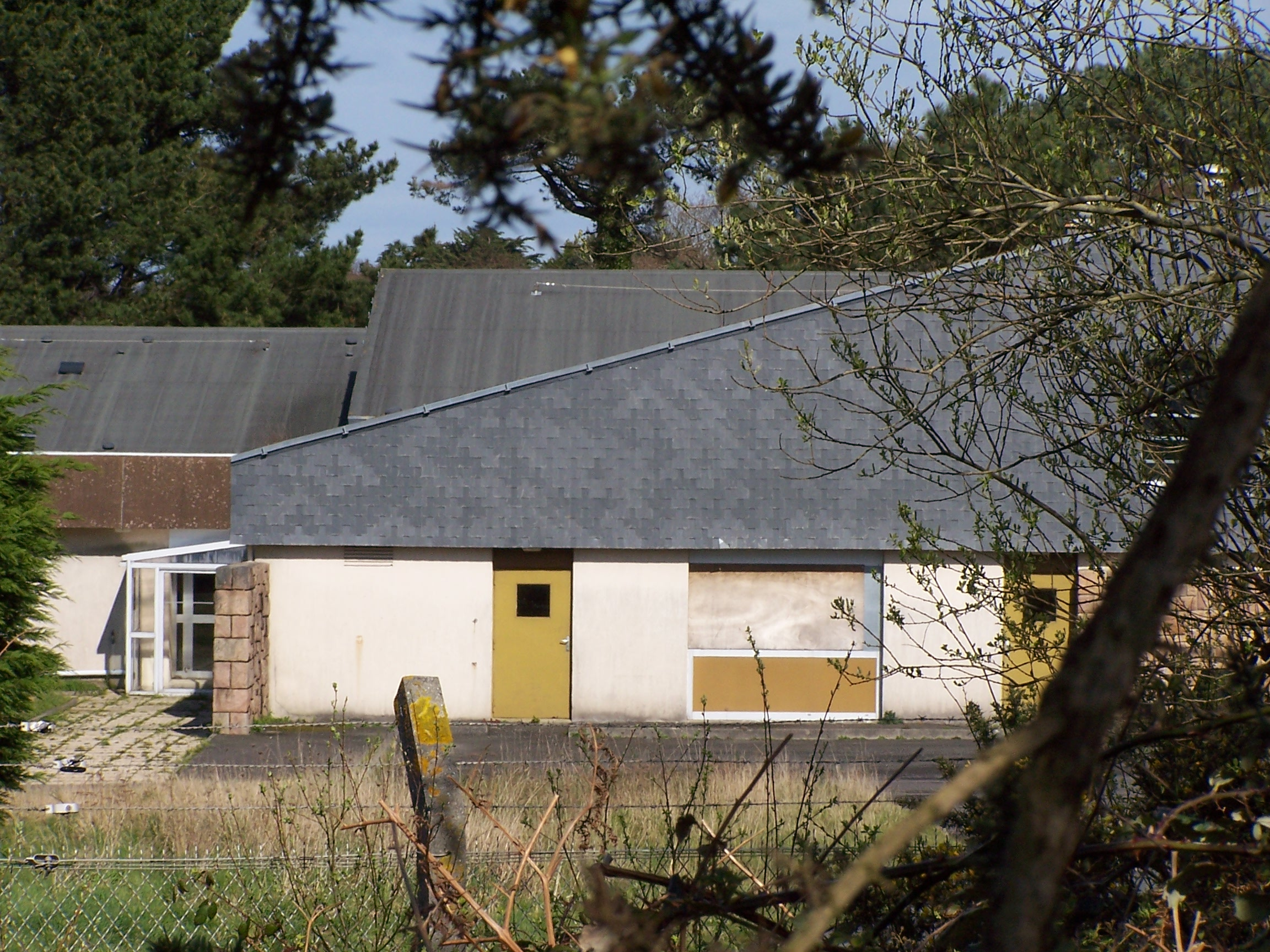 Restaurant CTS / Pleumeur-Bodou / France